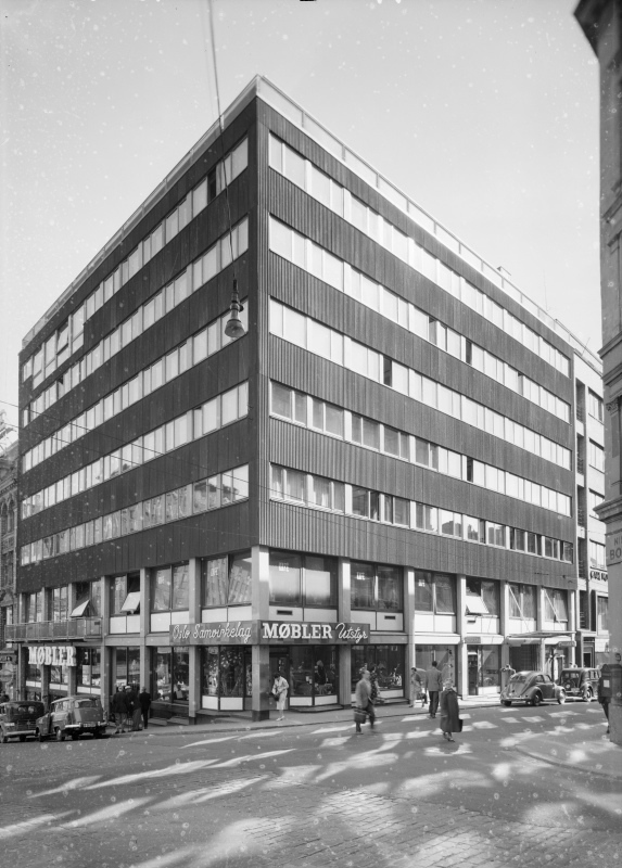 Arkitekturfoto av Venstres hus, ved Youngstorget. Huset går også under navnet "Skeiva", og blei innviet i 1954.